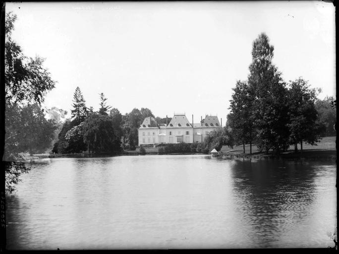 Ancien château de Voisins aujourd'hui disparu. (Saint-Hilarion).